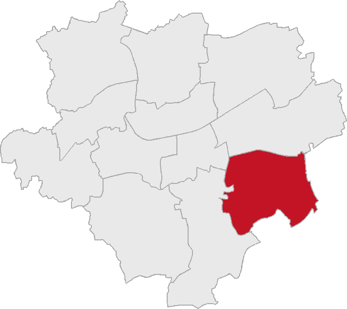 Lage des Stadtbezirks Aplerbeck in Dortmund.